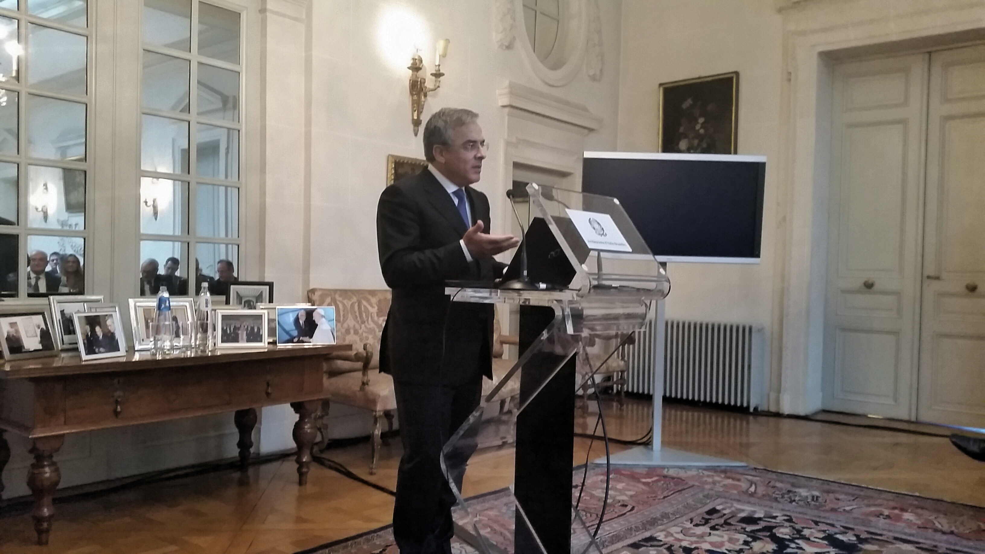 Domenico Casalino relatore ad un seminario presso la residenza del l'ambasciatore italiano a Bruxelles nel 2014.